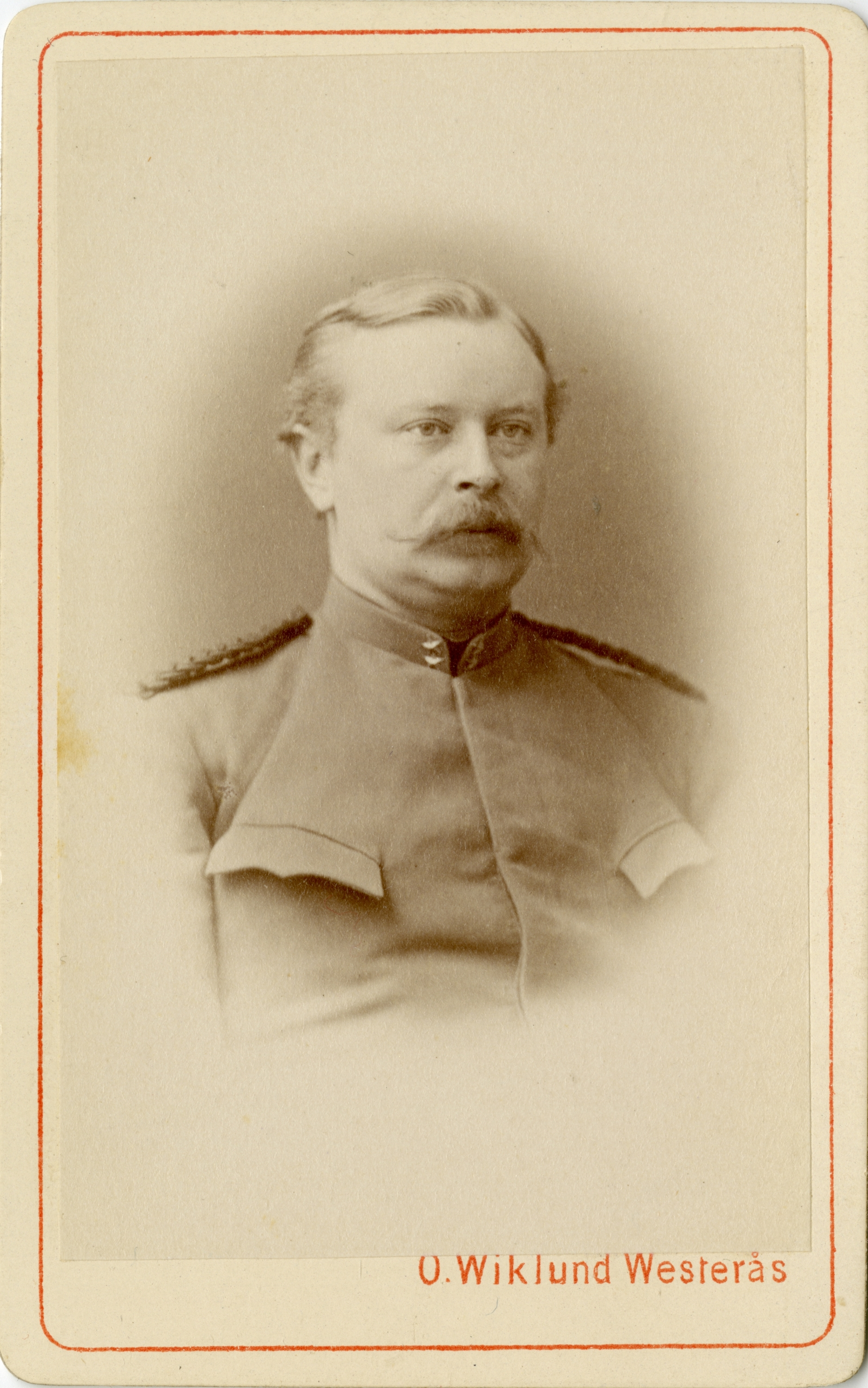 Porträtt av Erik Gustaf Kinell, löjtnant vid Fortifikationen.